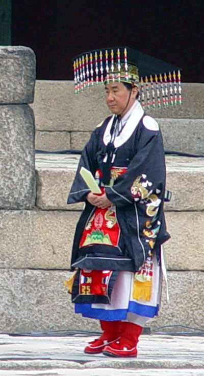 종묘대제 초헌관 이원 황사손의 모습.